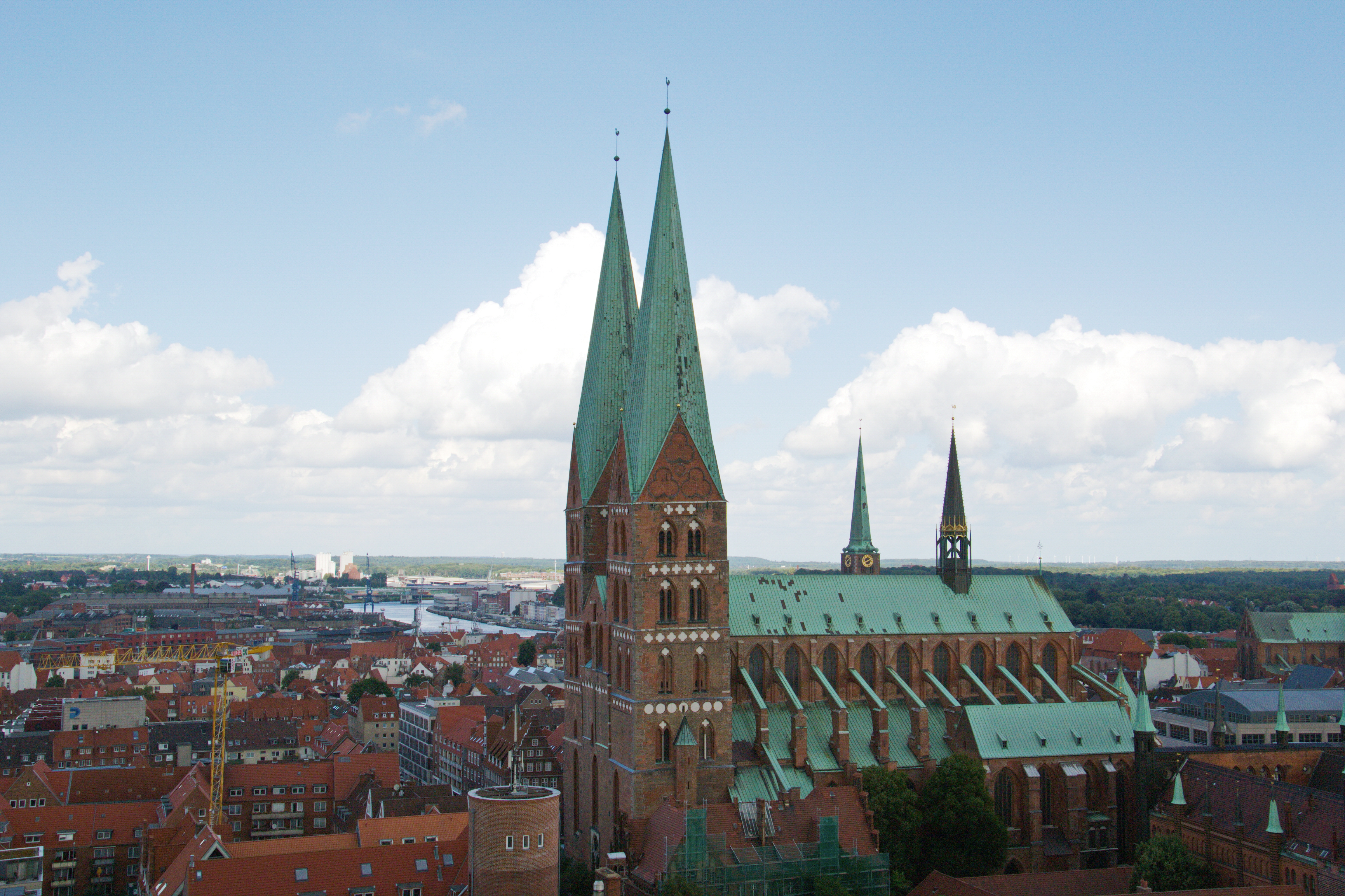 Lübeck Marienkirche